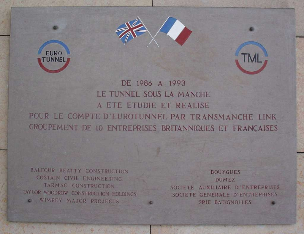 Plaque de présentation à Coquelles